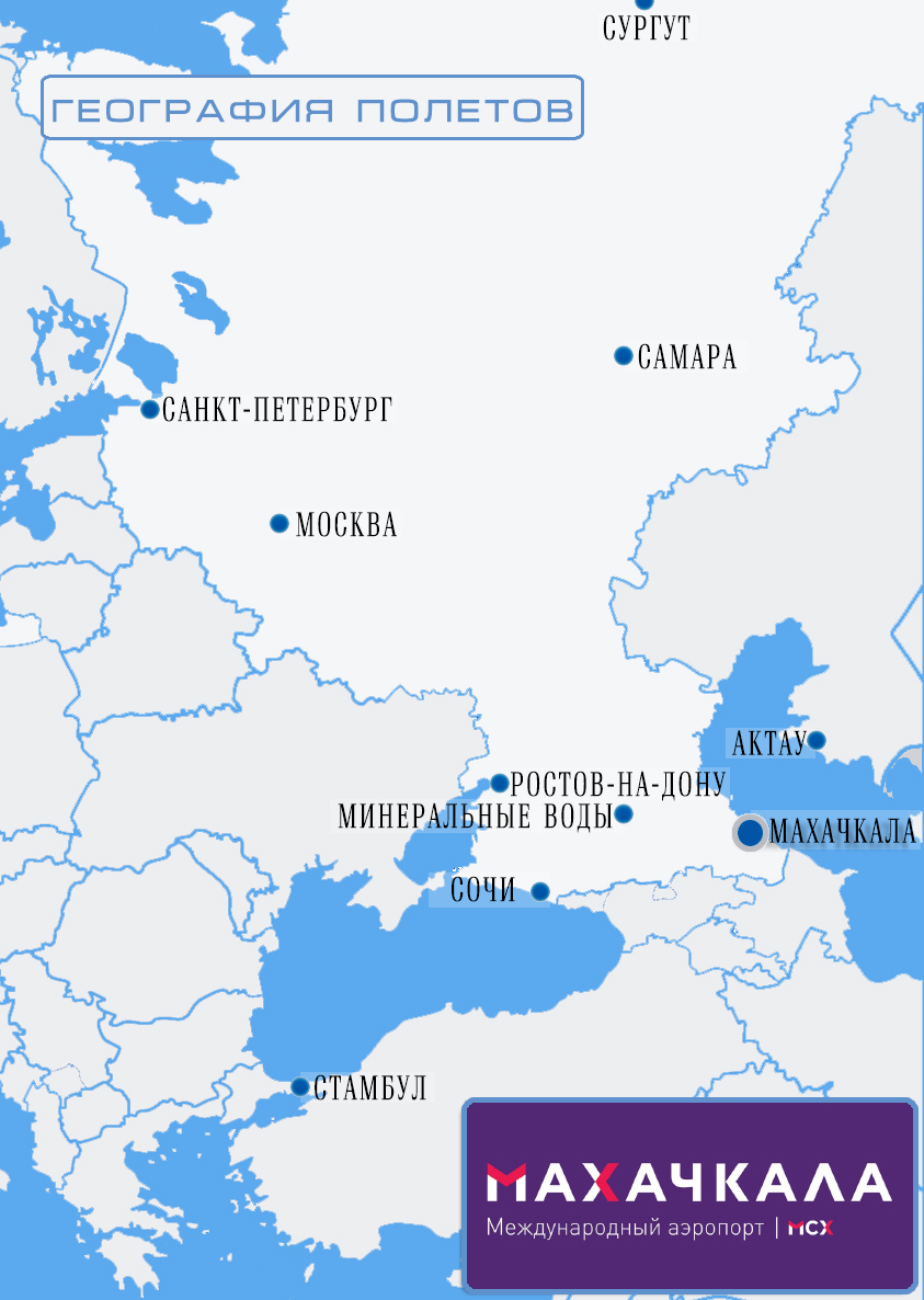 География полетов аэропорта Махачкалы на 12.10.2015